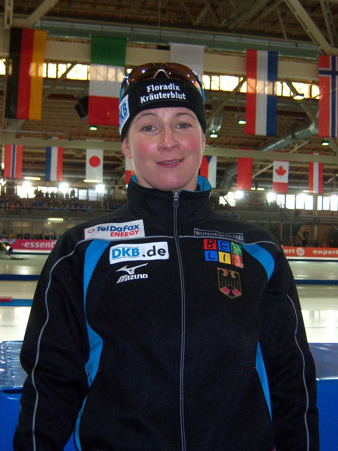 Claudia Pechstein bei der Eisschnelllauf-Weltmeisterschaft 2008 in Berlin